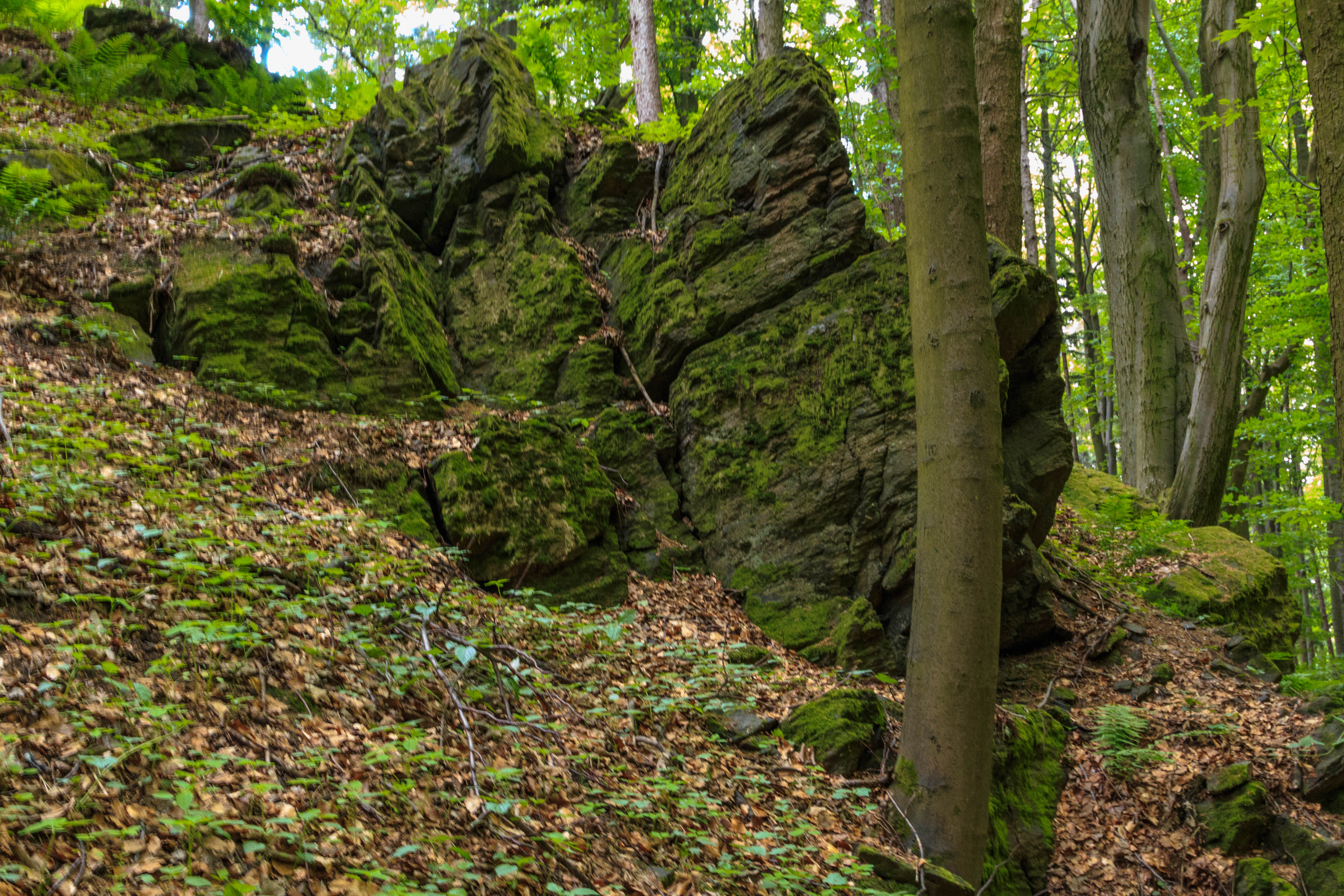 Přírodní rezervace Spálava Project: Chráněná území.